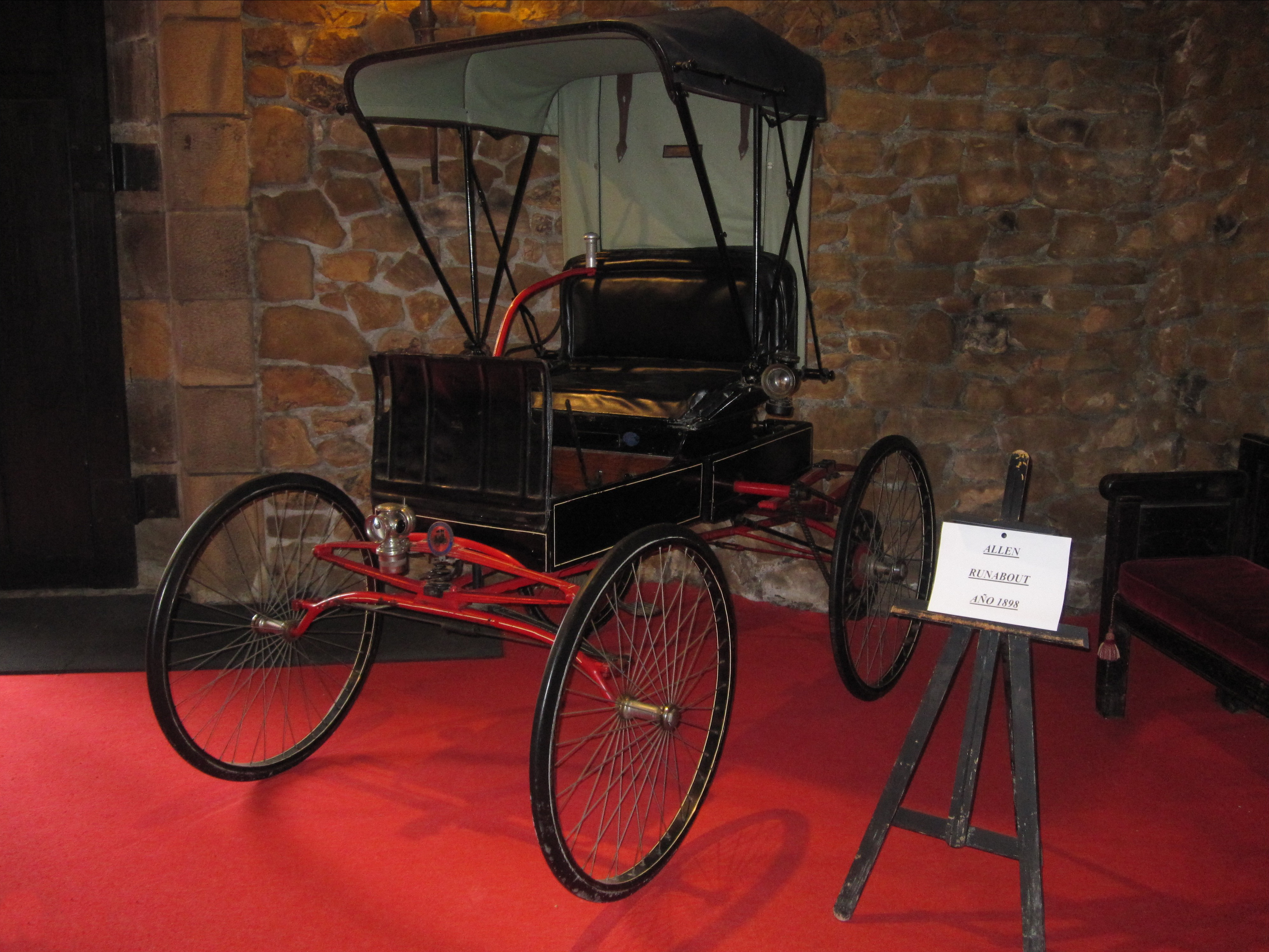 1898 Allen Runabout